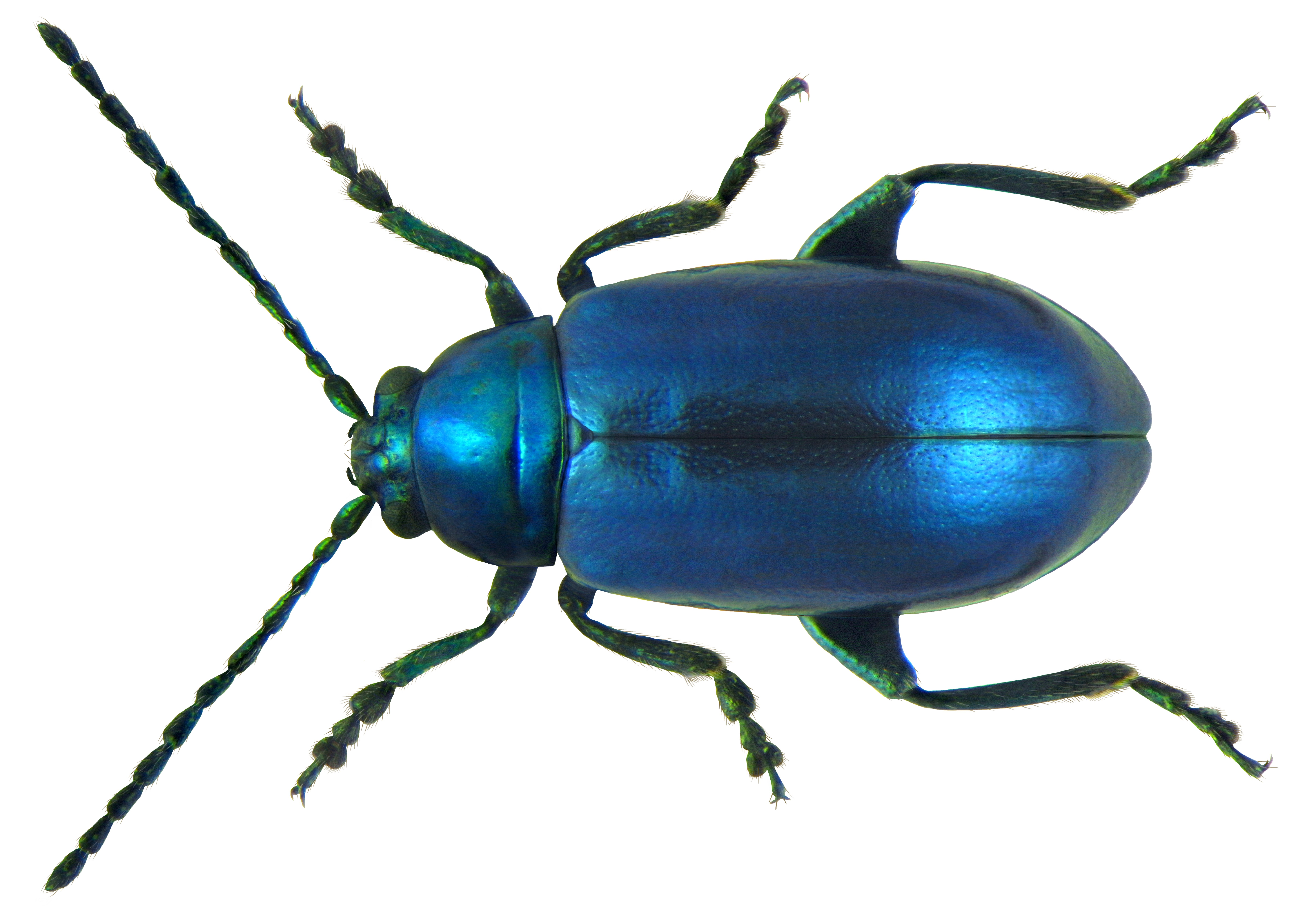 Familie: Chrysomelidae Groesse: 3,5-5,5 mm Verbreitung: Mitteleuropa Oekologie: an feuchtigkeitsliebenden Epilobium-Arten Fundort: Germania, Bayern, Oberfranken, Selbitz leg.det. U.Schmidt, 2003 Photo: U.Schmidt, 2011